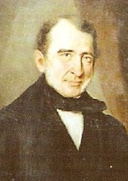 Franz Anton von Balling (1800-1875), german physician